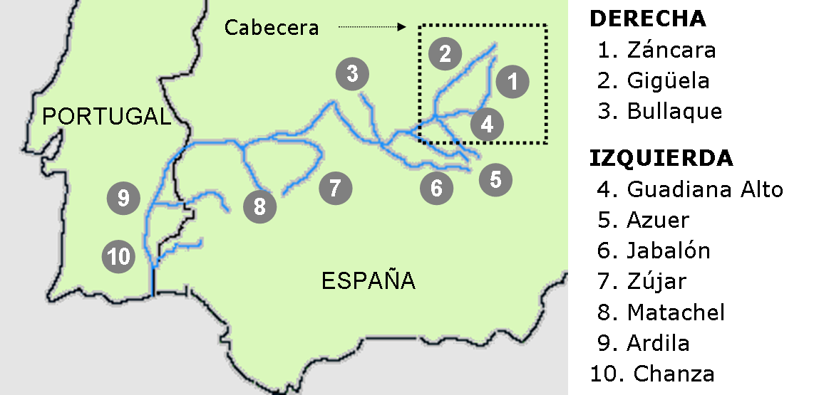 Mapa de los afluentes del río Guadiana